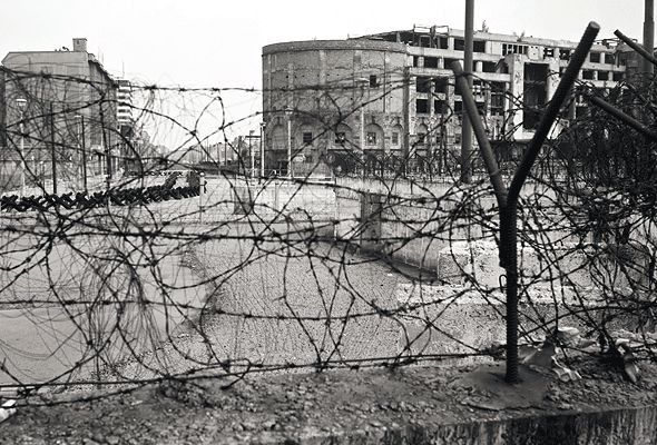 Berliner Mauer am Potsdamer Platz, Blick in die Stresemannstraße.